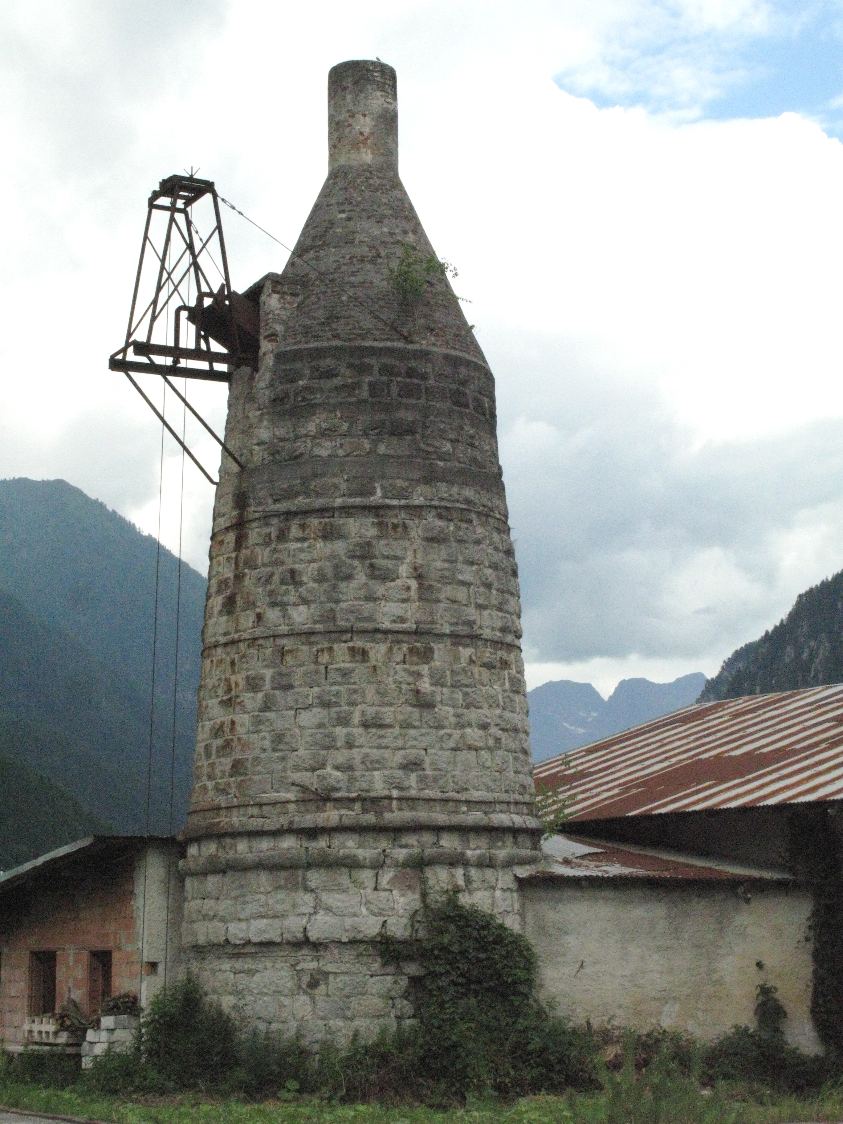 Alen Héichuewen zu Canal San Bovo (Italien).